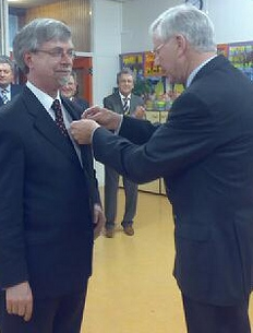 Text on Flickr: "Jos van Veldhoven is 25 jaar Dirigent van de Bachvereniging en kreeg van het Bachcomité in Aardenburg een gouden speld uitgereikt. In Aardenburg vond dit jaar de 55e uitvoering van de Matthäuspassion plaats."